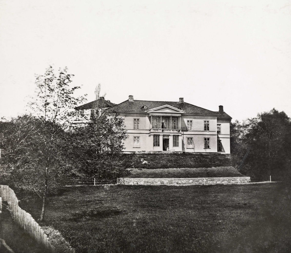 Nedre Munkedammen, Munkedamsveien 75. Foto: Olaf Martin Peder Væring, ca. 1870-årene. Fra Byhistorisk samling hos Oslo Museum.